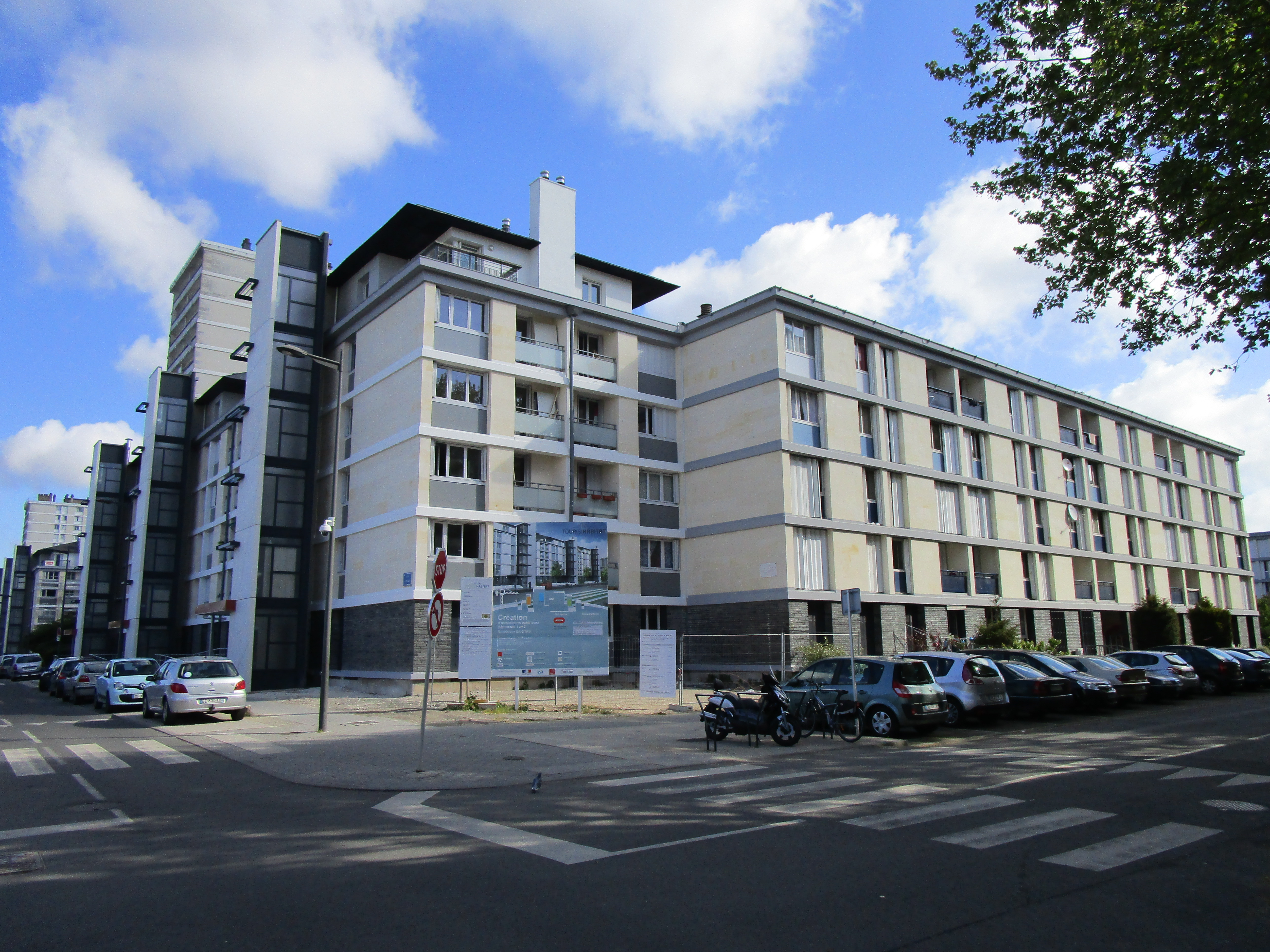 Vue d'une partie du lot des 811 dans le quartier Sanitas, à Tours, vue depuis la rue Jacques Marie Rouge